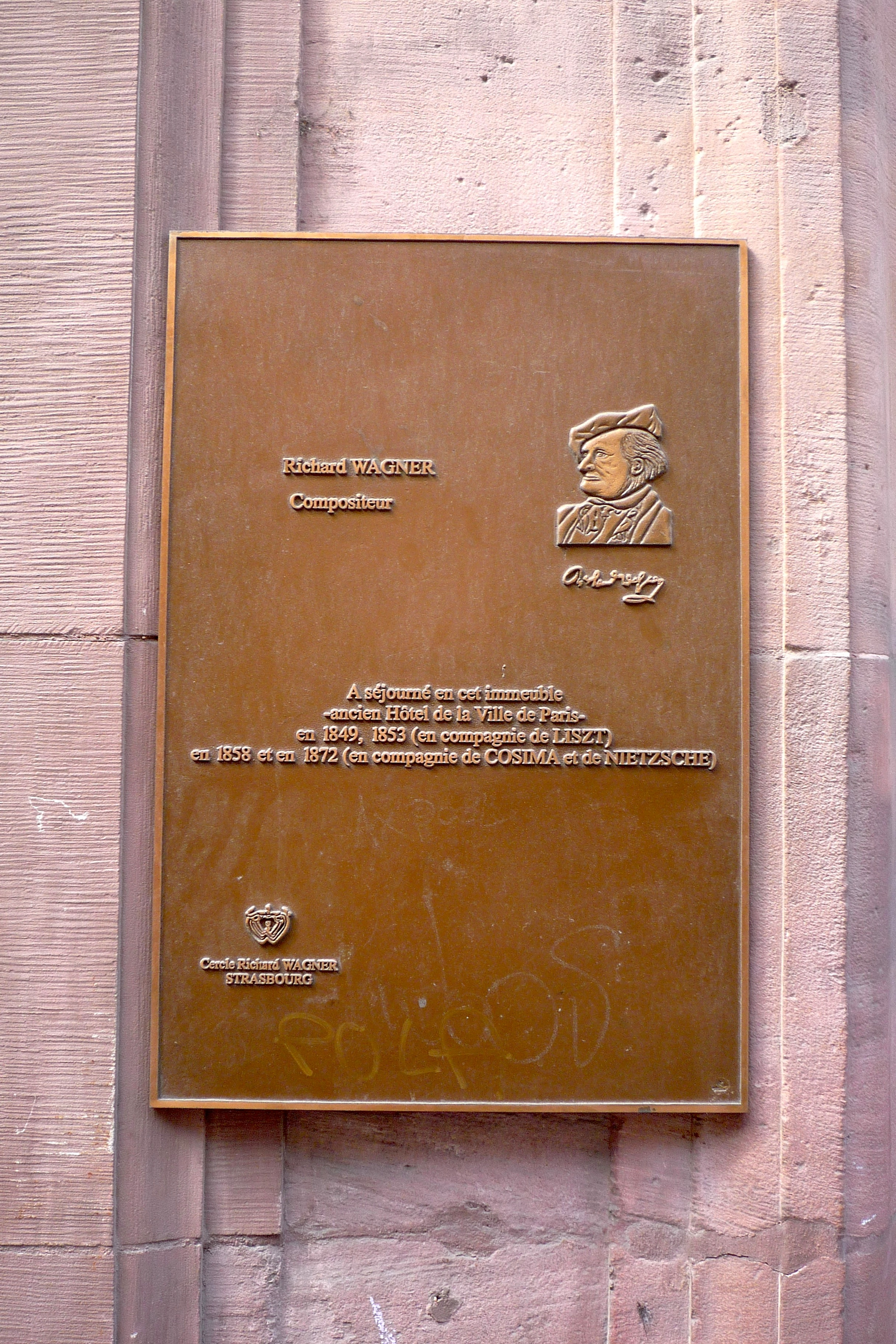 Strasbourg, plaque commémorative des visites de Richard Wagner, apposée sur l’immeuble 13 rue de la Mésange.